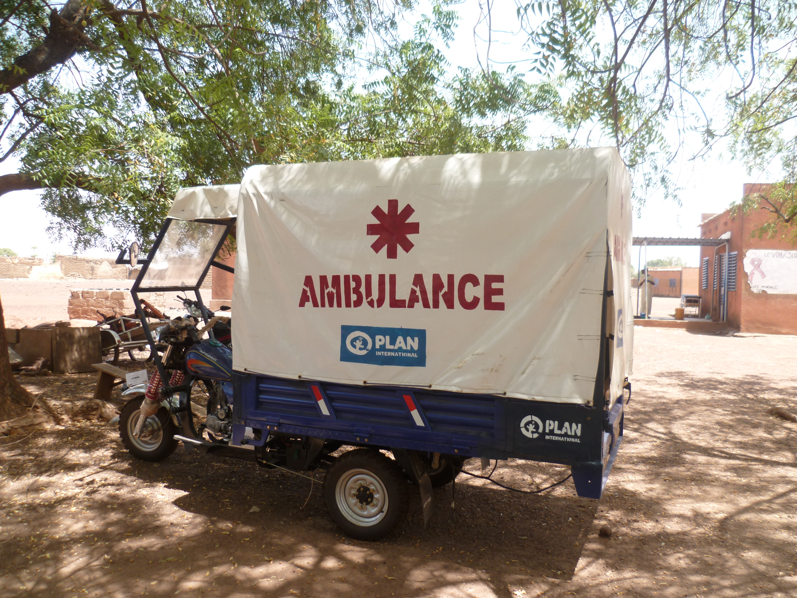 Yilou - Triporteur Ambulance This is an image with the theme "Africa on the Move or Transport" from: Burkina Faso